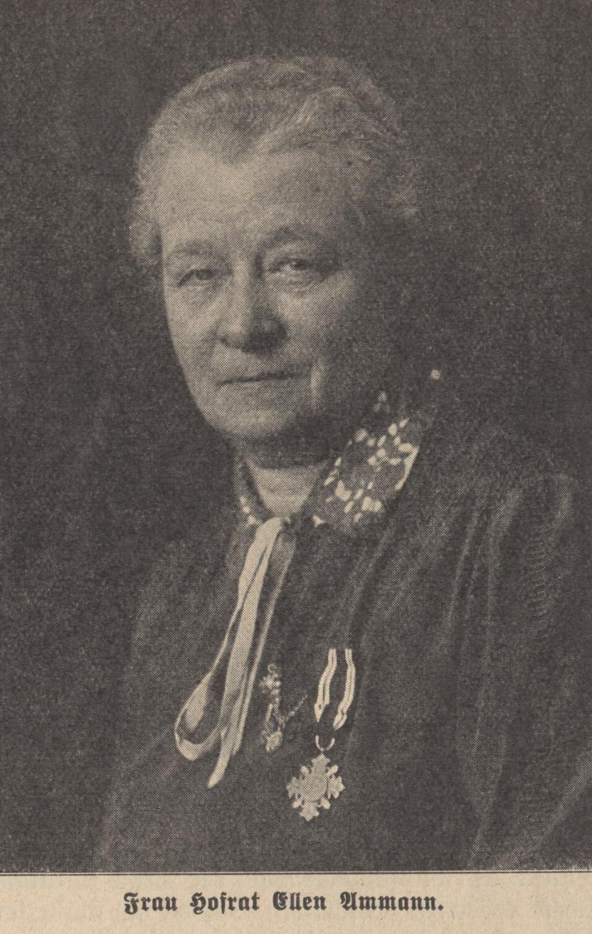 Ellen Ammann, Bayerische Landtagsabgeordnete, Gründerin des kath. bayerischen Frauenbundes